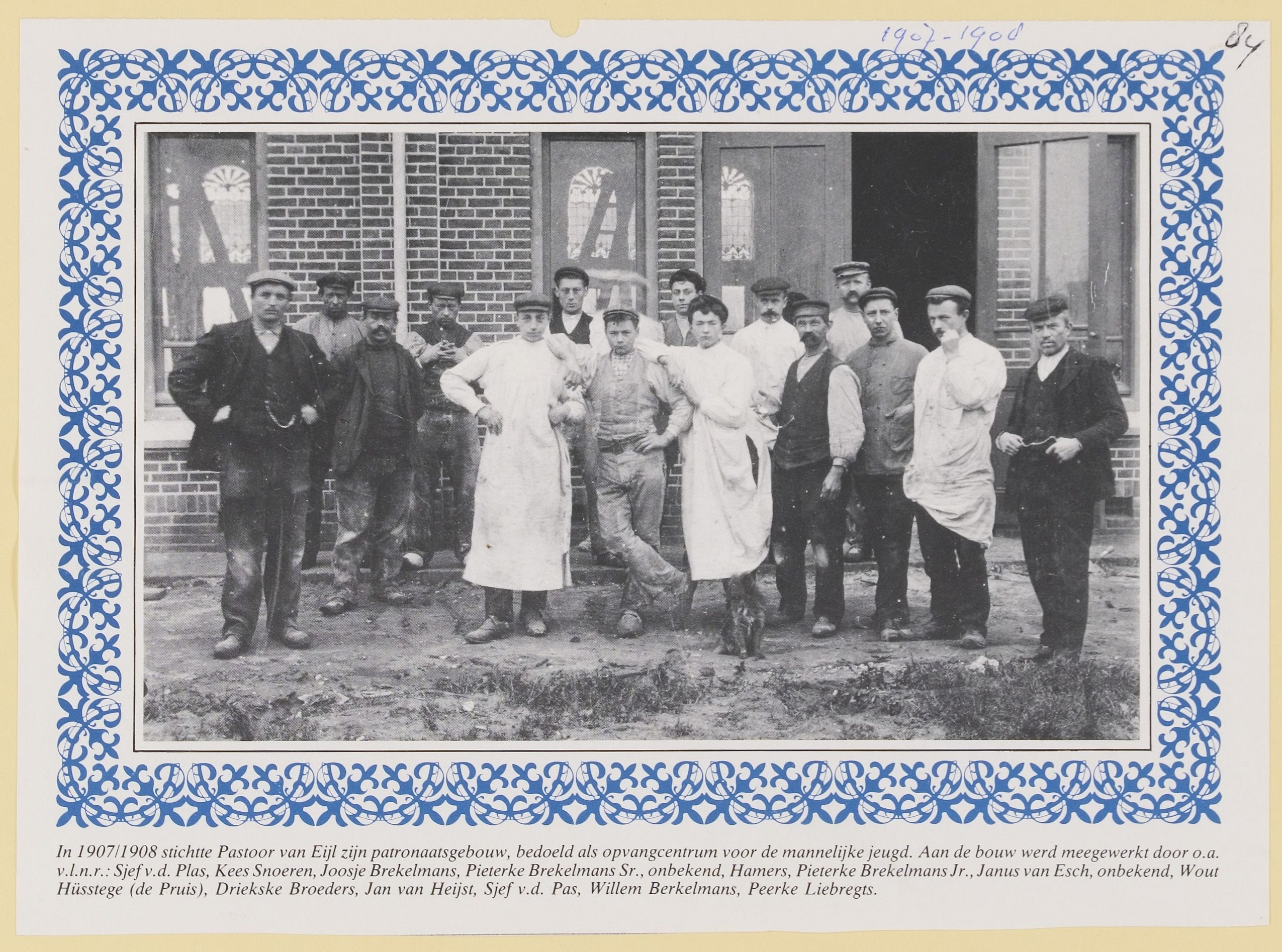 Werkers aan een patronaatsgebouw in Udenhout in 1907